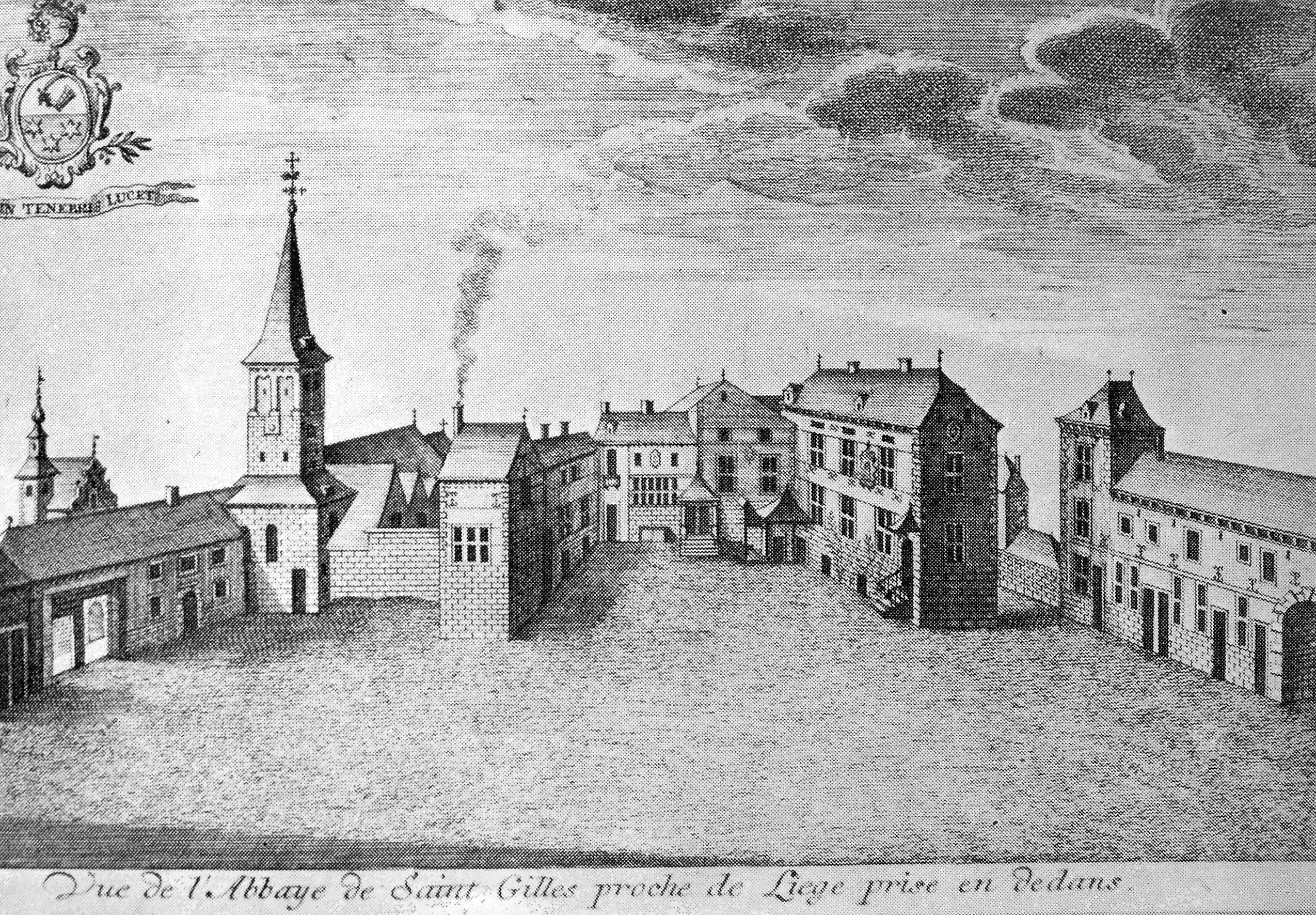 Abbaye de Saint-Gilles en 1740, intérieur, gravure de Remacle le Loup